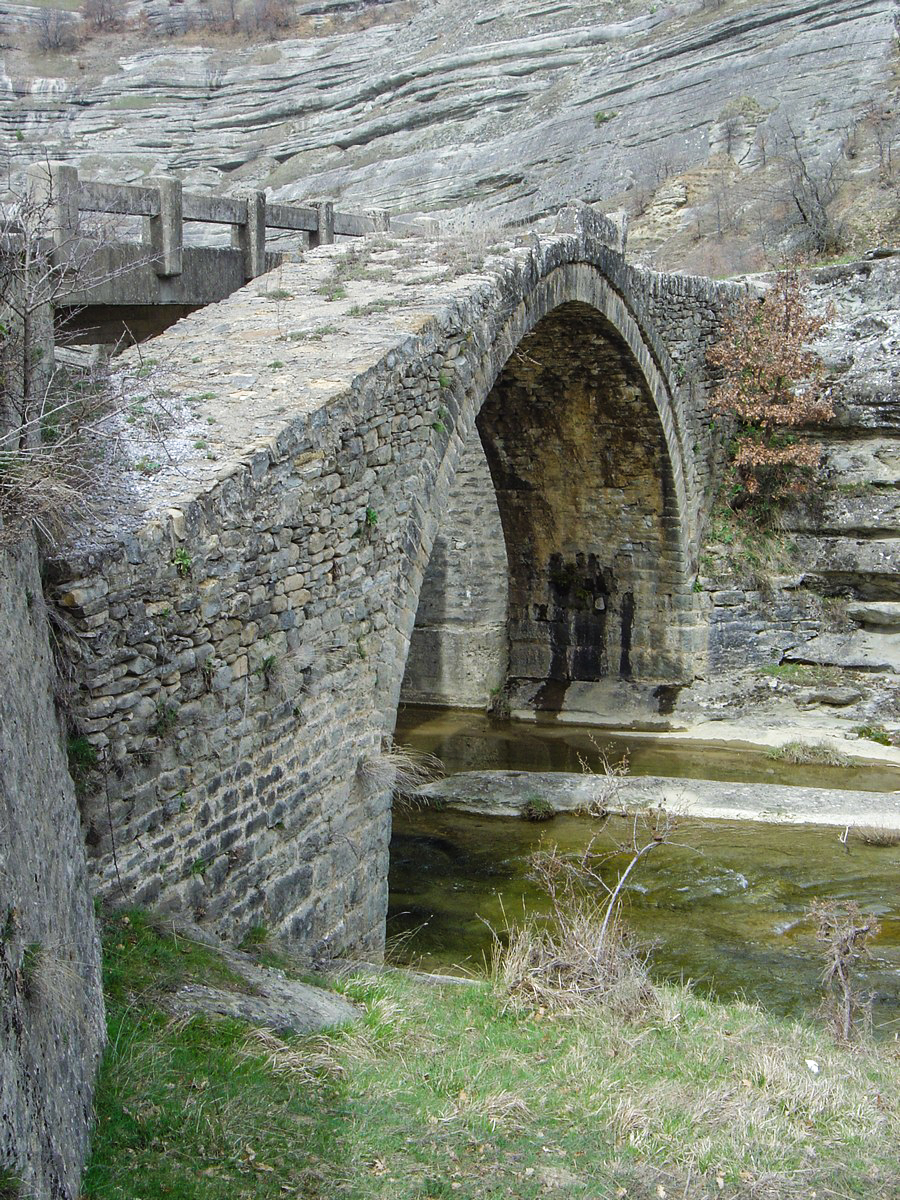 Το παλιό πέτρινο γεφύρι της Χρυσαυγής στο Τριτσιώτικο ρέμα, χτισμένο το 1795